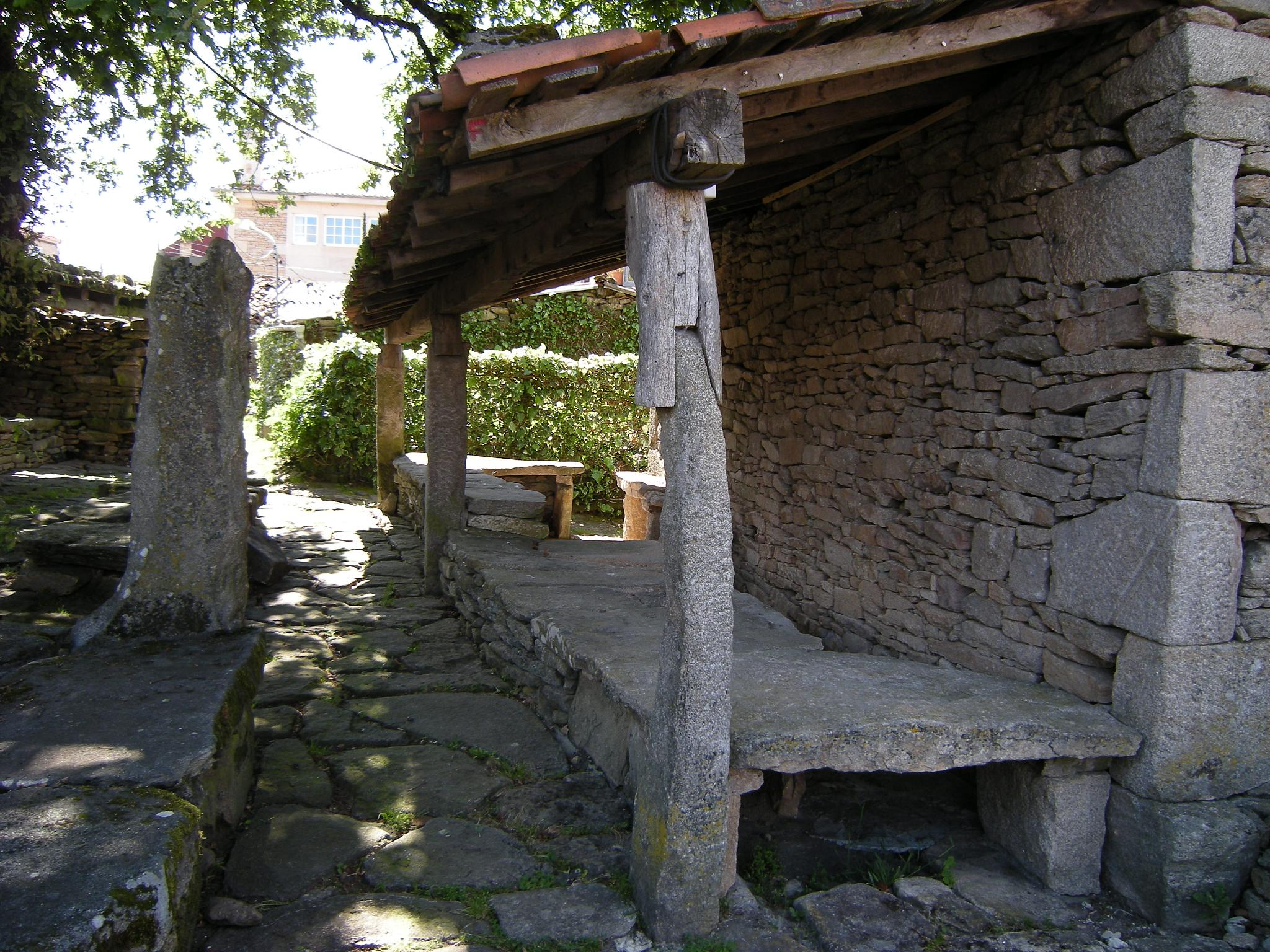 gl: Mercado medieval de Agolada